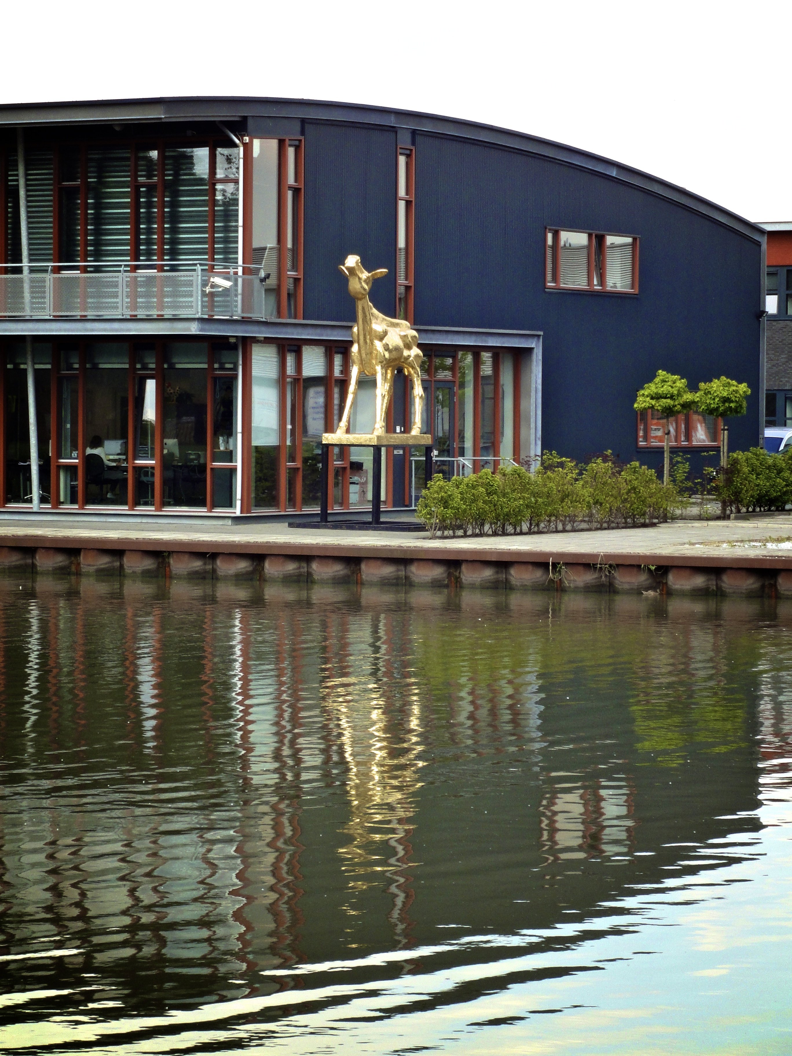 Gouden Kalf NFF (Dutch Film Festival)